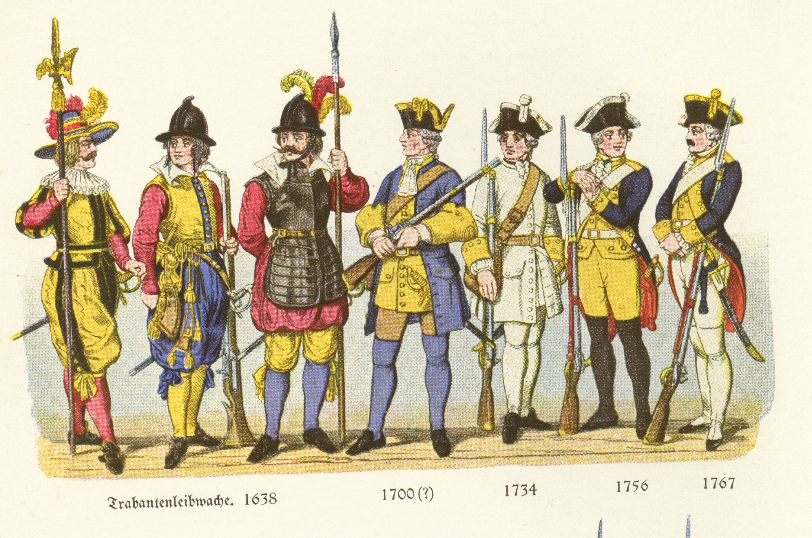 Stadlinger Tafel I oben: 1. Infanterieregiment (Grenadierregiment Königin Olga, 1. württembergisches, Nr. 119) 1638-1767.